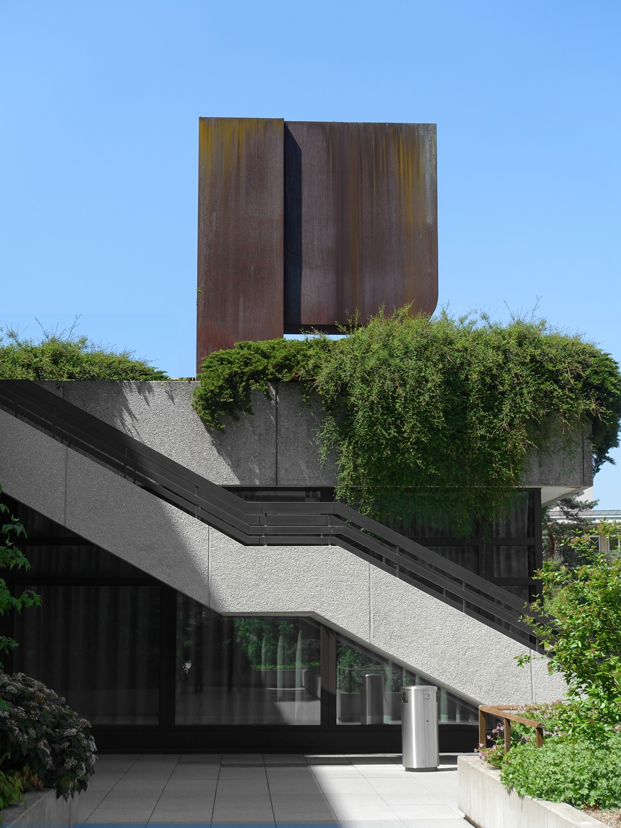 Matias Spescha (1925–2008) Maler, Bildhauer und Grafiker. 1979, 3 Grossplastiken, ohne Titel. Universitätsspital Basel. Standort: 47°33'41.5"N 7°34'56.4"E, 47.561536, 7.582342